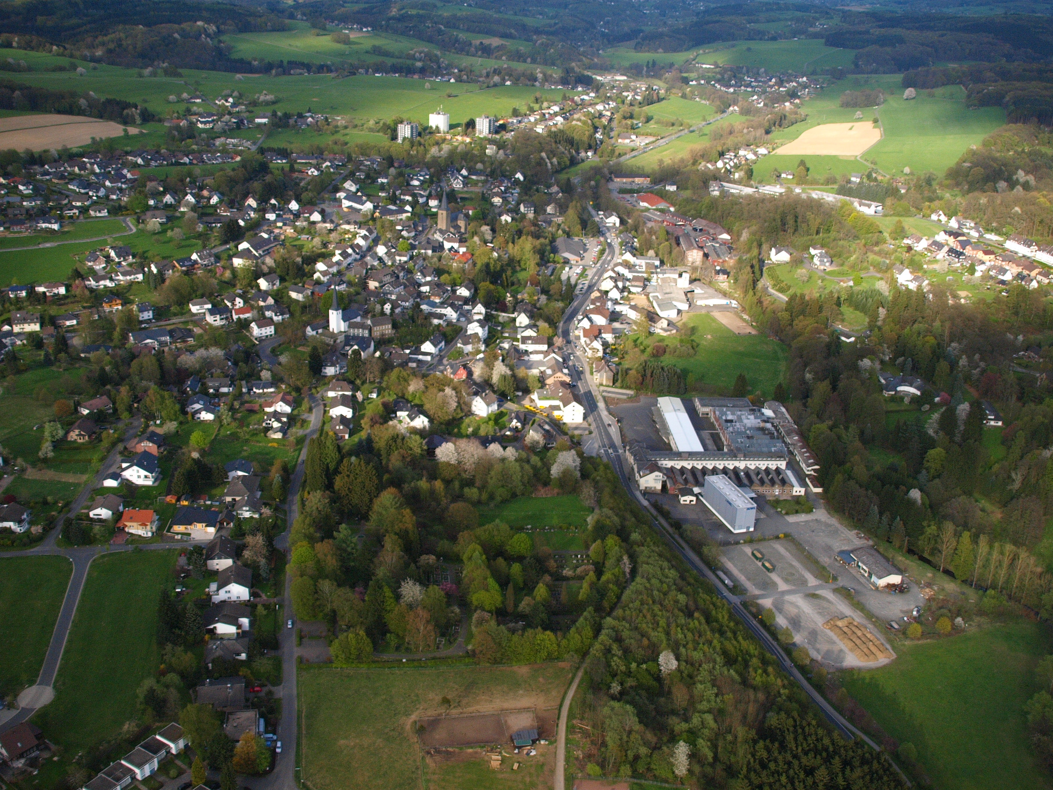 Luftaufnahme von Ruppichteroth